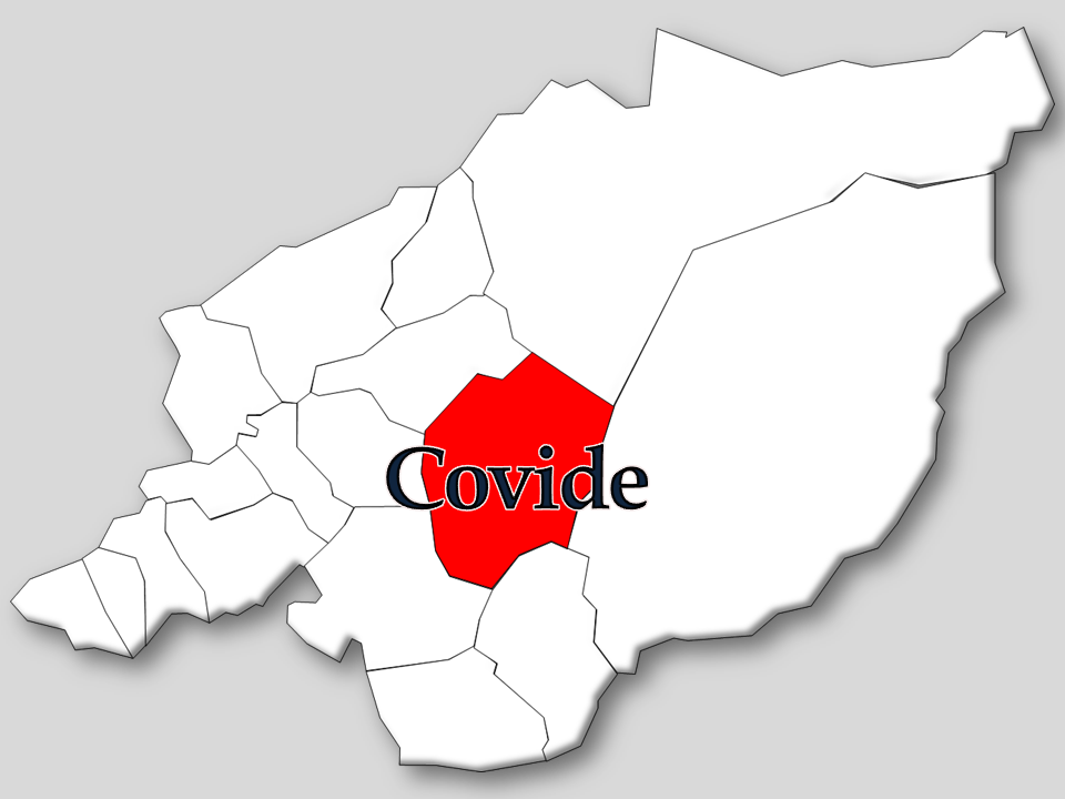 Censos 1864/2011